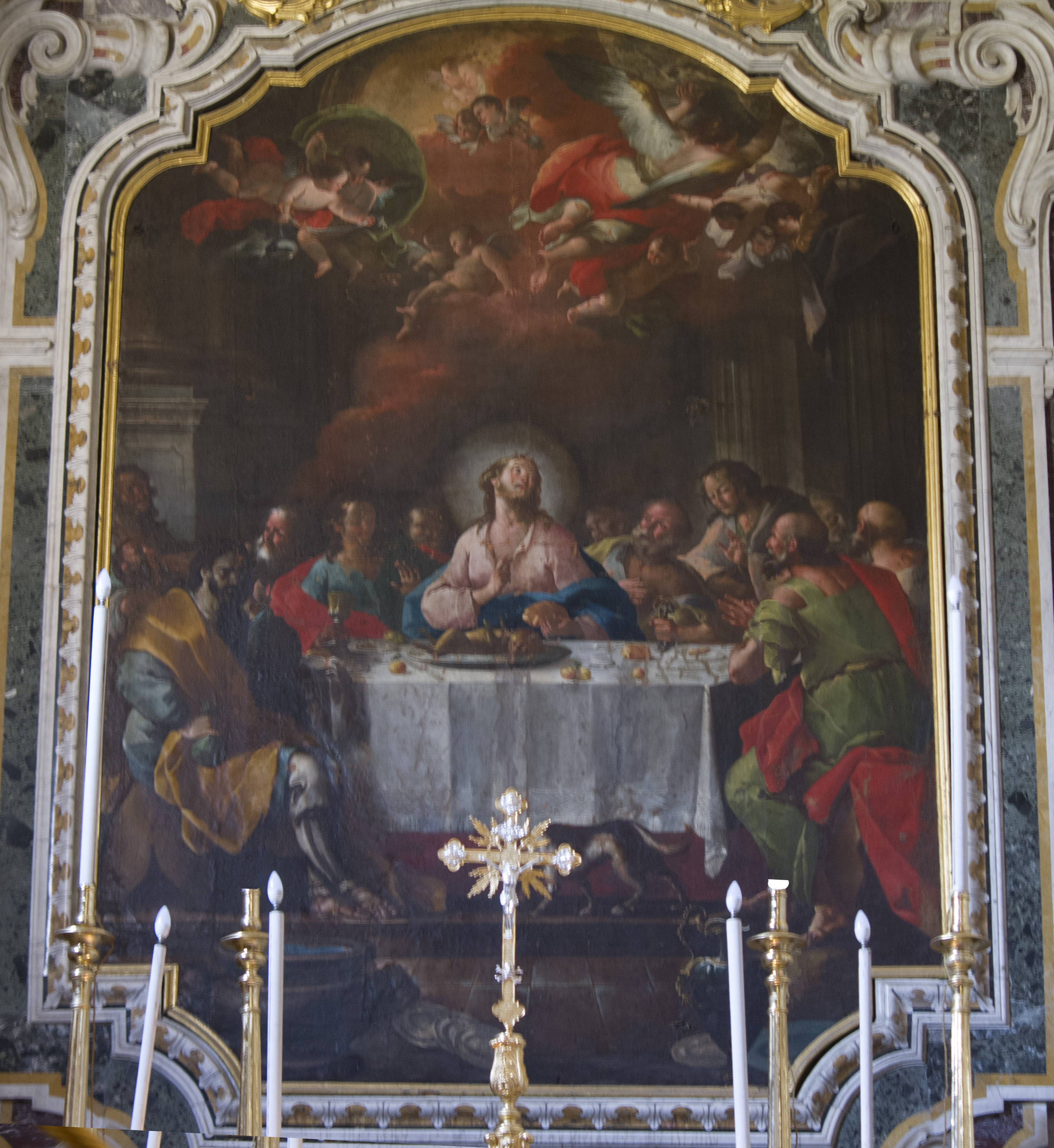 Dipinto dell'Ultima Cena del pittore Domenico Antonio Carella. Si trova nella chiesa matrice di Francavilla Fontana, in una cappella situata a sinistra dell'altare maggiore.